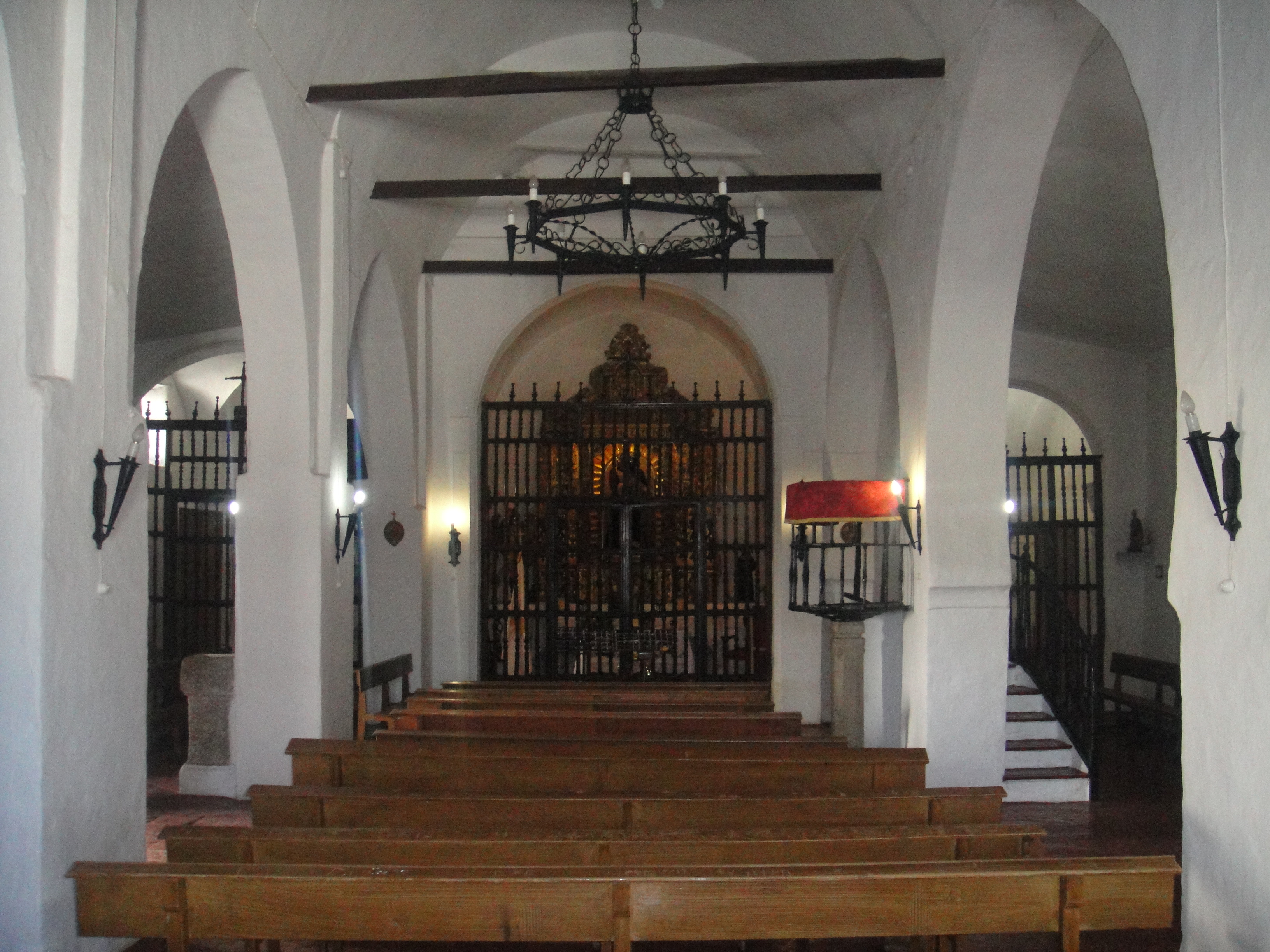 Vista general del interior de la Ermita de Jesús Nazareno de Fuente Obejuna, provincia de Córdoba, (España).